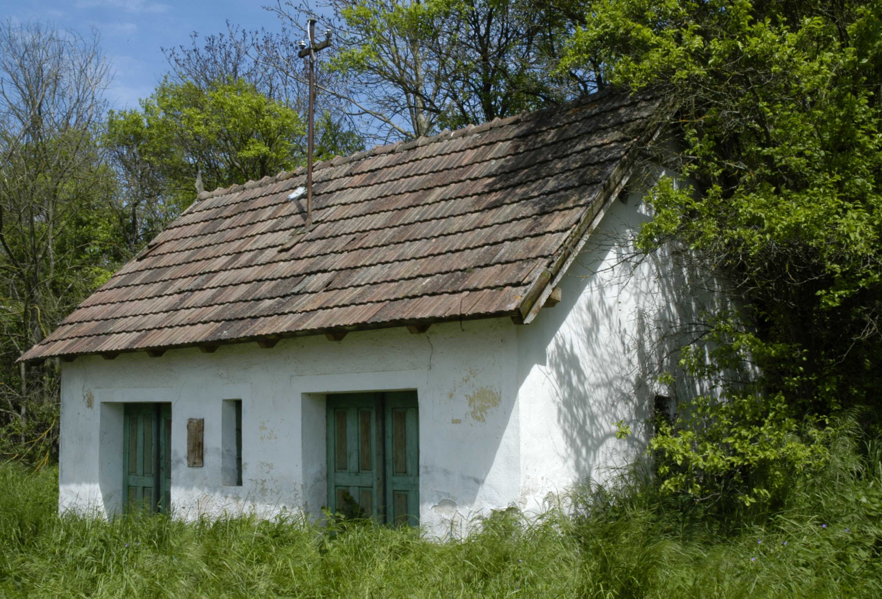 Objekt in der Mühlkellergasse in Frauendorf an der Schmida